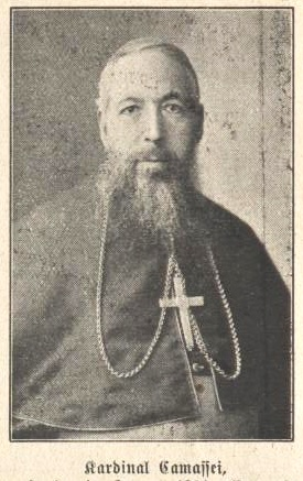 Filippo Camassei, Kardinal und Lateinischer Patriarch von Jerusalem (1848-1921)